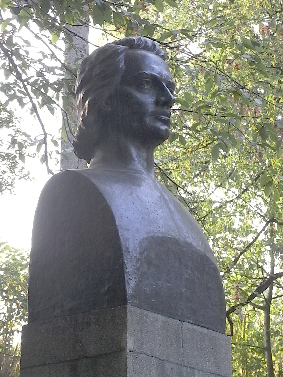 Büste Mihai Eminescus (Eminovici) im Erlenpark in Hermannstadt